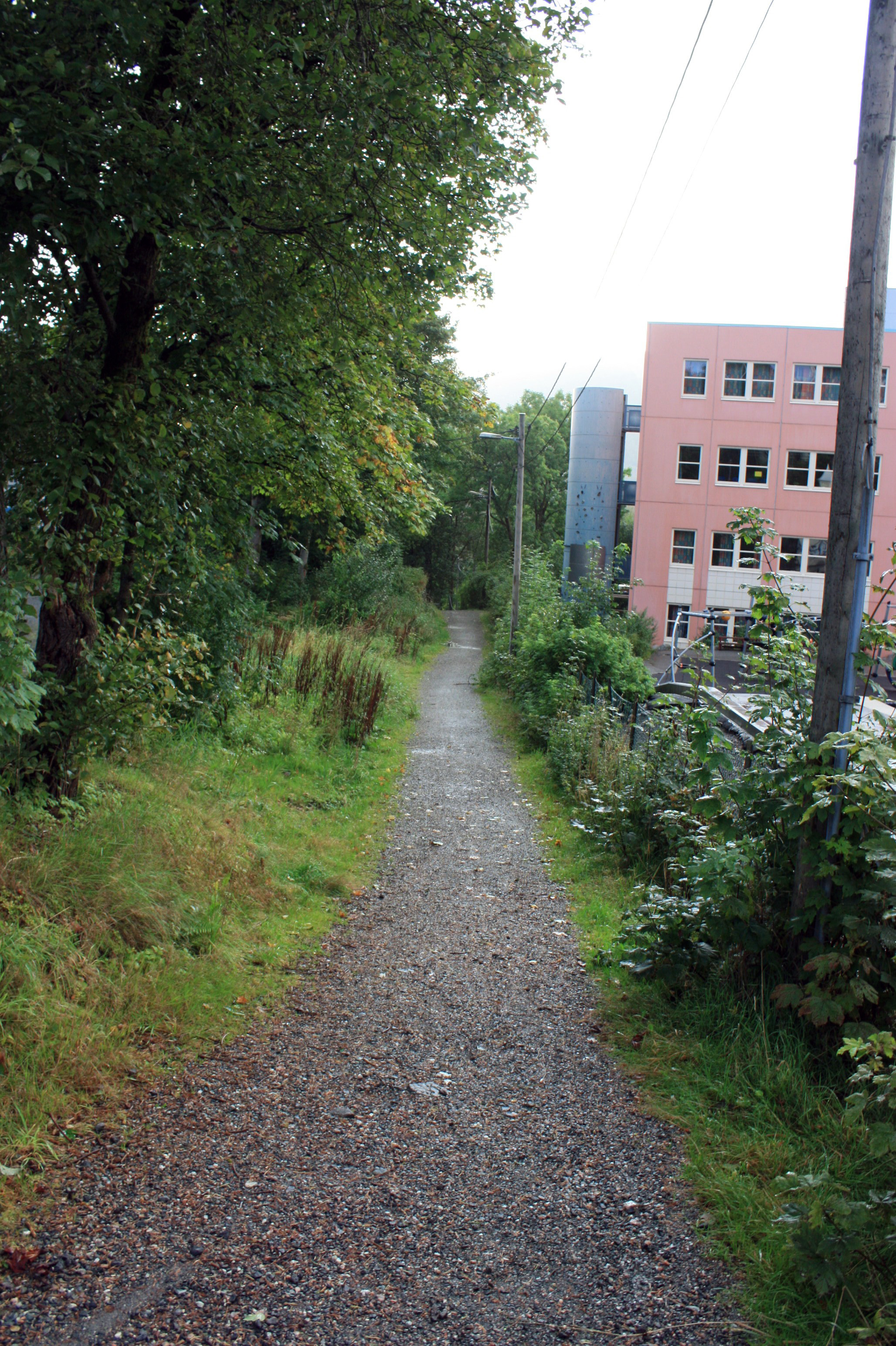 Skolestien, Fana, Bergen.